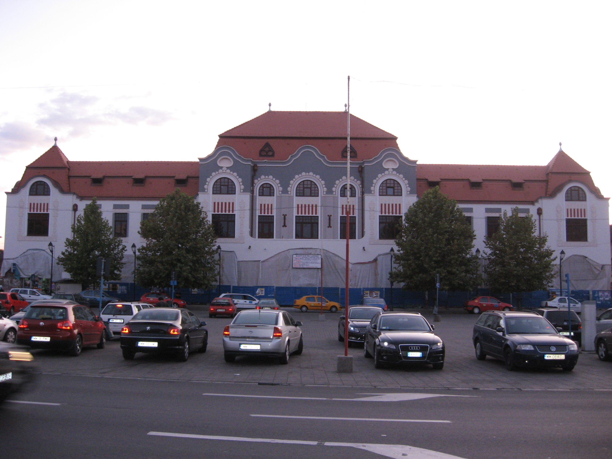 Complex hotel - restaurant "Minerul", fost Sf. Ştefan - Baia Mare